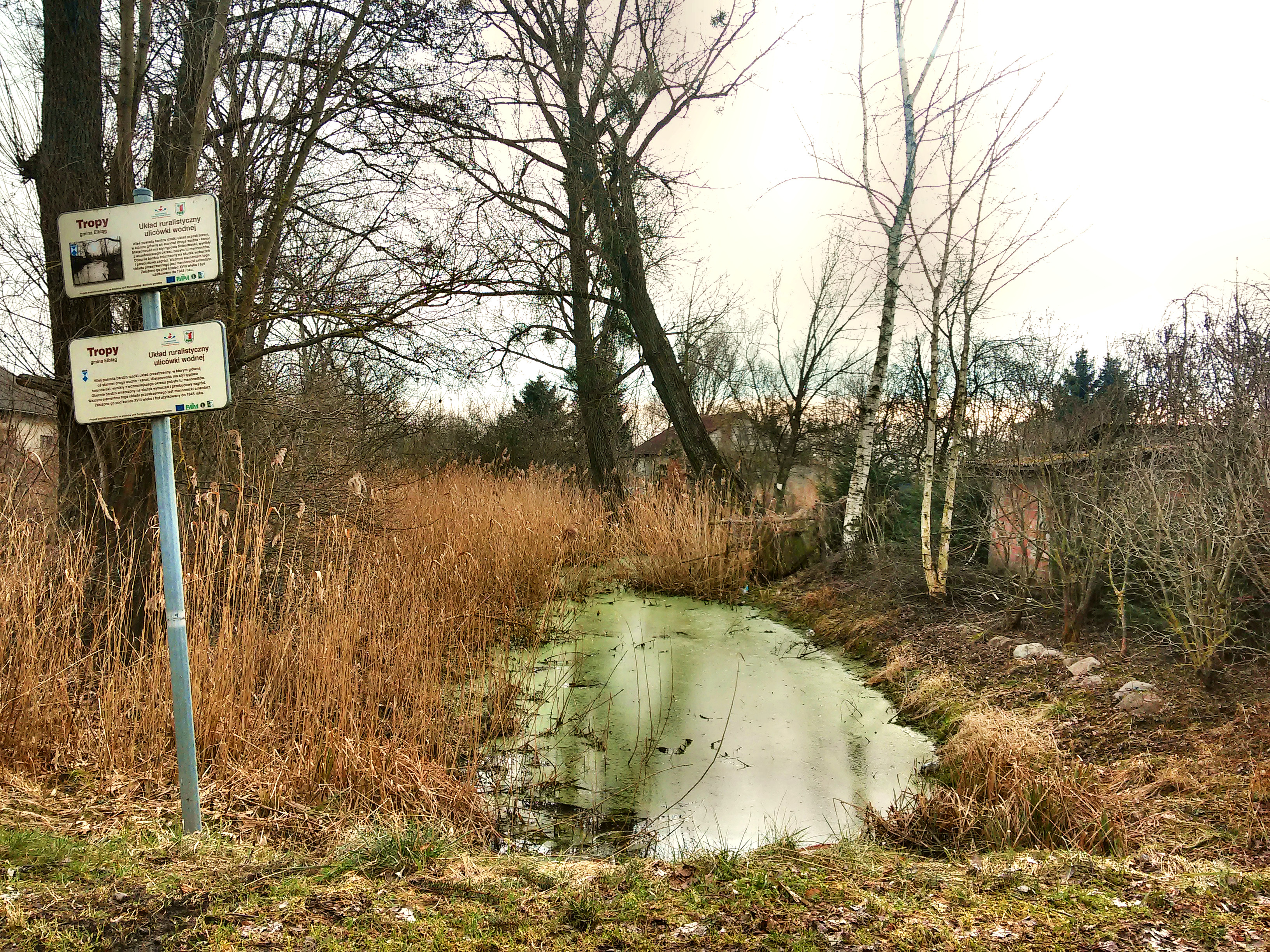 Tropy Elbląskie, układ ruralistyczny, XVIII, XIX